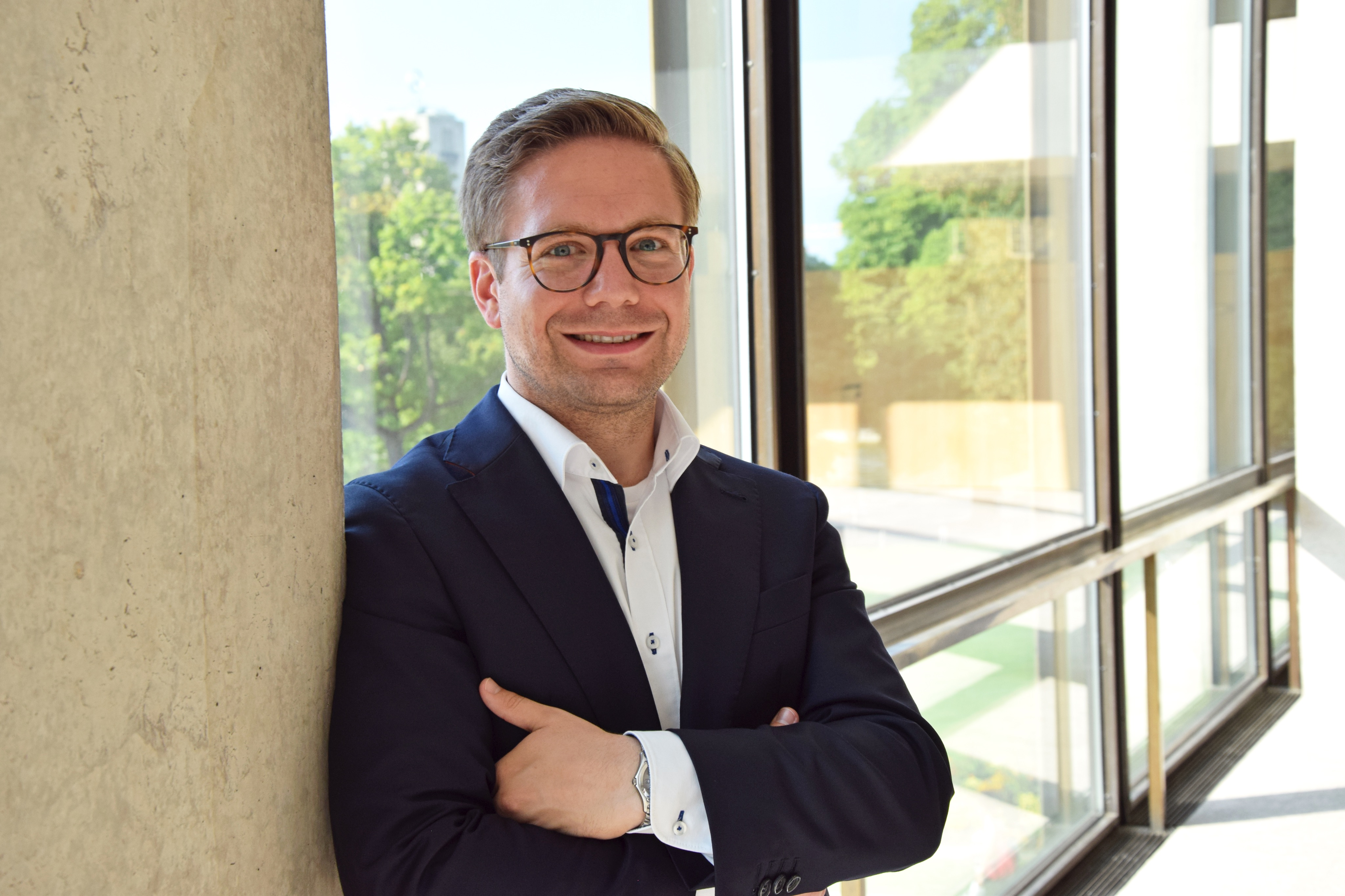 Fabian Gramling im Landtag von Baden-Württemberg.